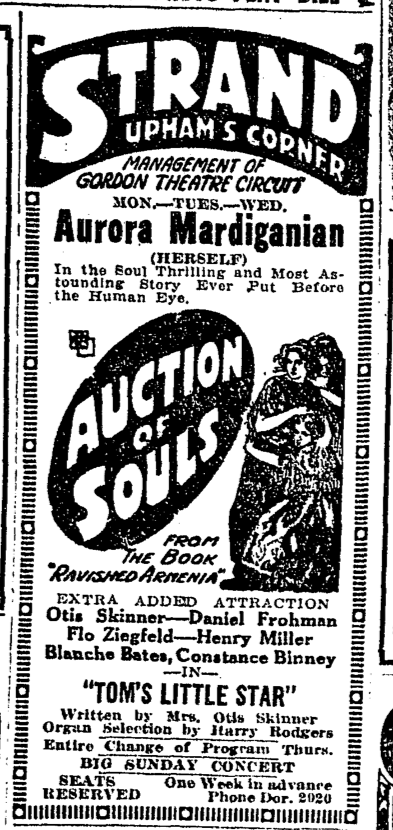 Advertisement, Boston, Massachusetts, USA